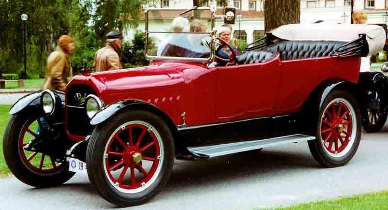 Peerless Model 56 7-Passenger Touring 1917